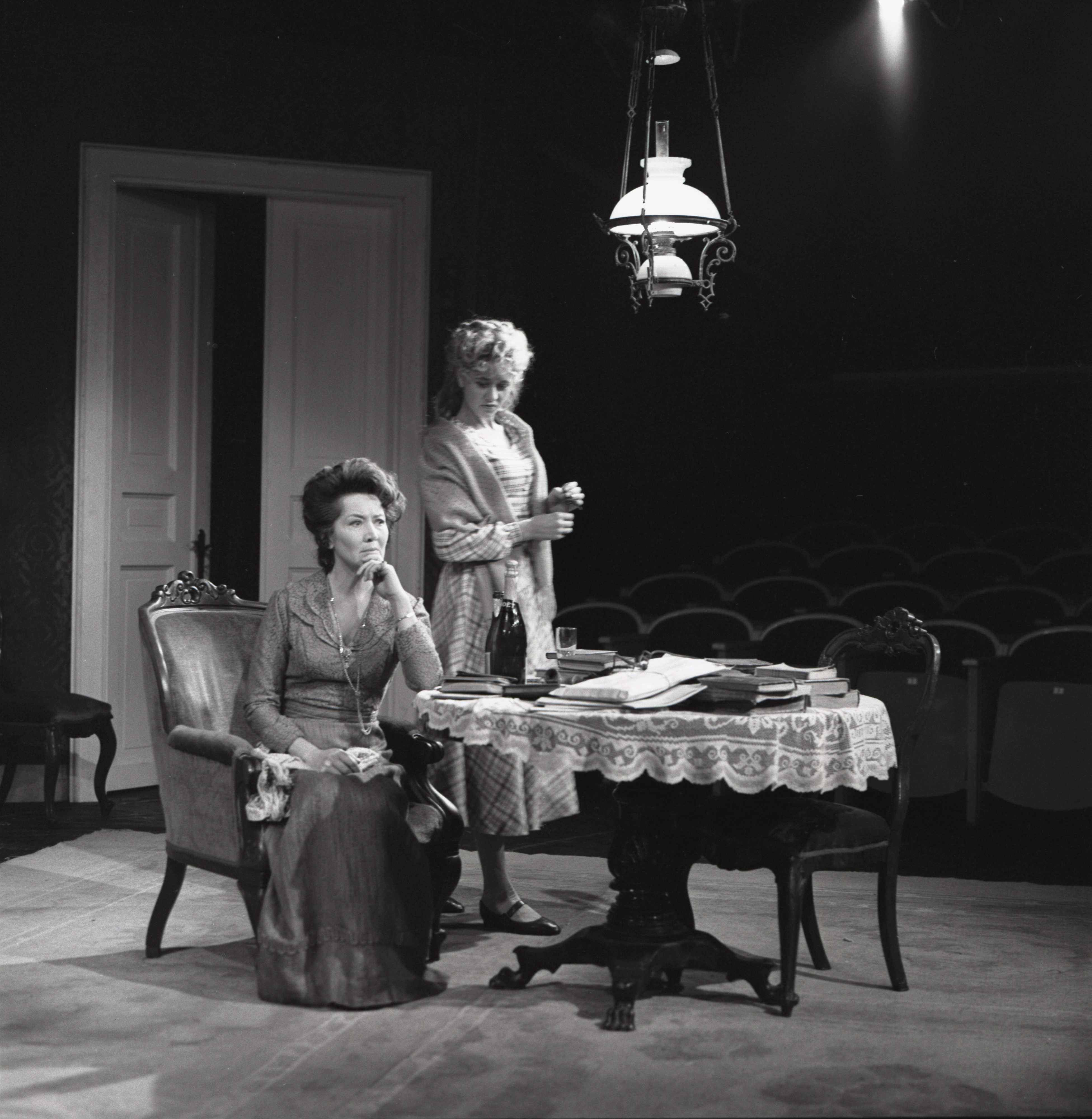 Scene fra Nathionaltheatrets oppsetning av Henrik Ibsens "Gengangere". Fru Alving sitter i en lenestol ved et bord. Bak står Regine Engstrand. På bordet står en flaske sjampanje og mange bøker. Forestillingen hadde premiere 4. oktober 1972. Pål Løkkeberg hadde regi og medvirkende var Helen Brinchmann som fru Alving, Frøydis Armand som Regine Engstrand, Svein Sturla Hungnes som Osvald, Frank robert som Pastor Manders og Rolf Søder som Snekker Engstrand. Oslo